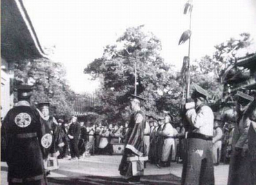 中文（中国大陆）: 1914年9月28日袁世凯祭孔